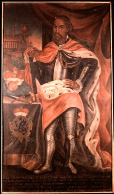 Portret imaginacyjny księcia Jaksy z Kopnika z klasztoru Norbertanek w Krakowie roku 1757